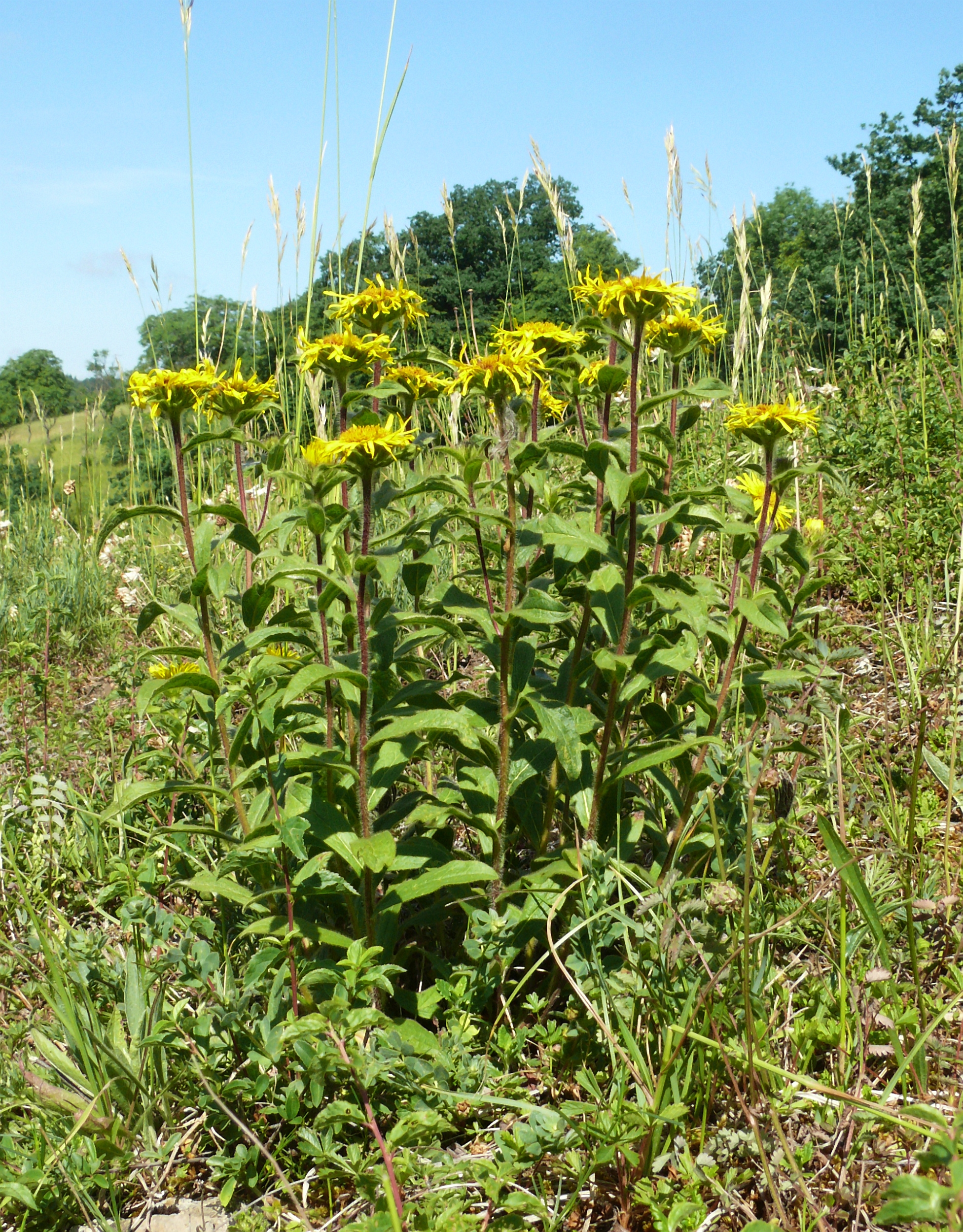 Inula hirta, Hohenlohe, Deutschland